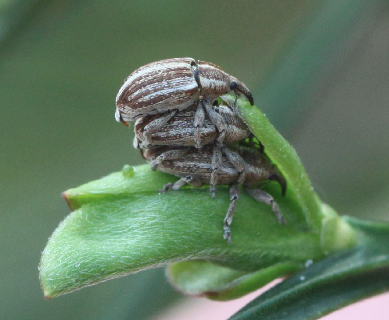 Rüsselkäfer Tychius parallelus am 16. April 2019 an Besenginster in der Schwetzinger Hardt